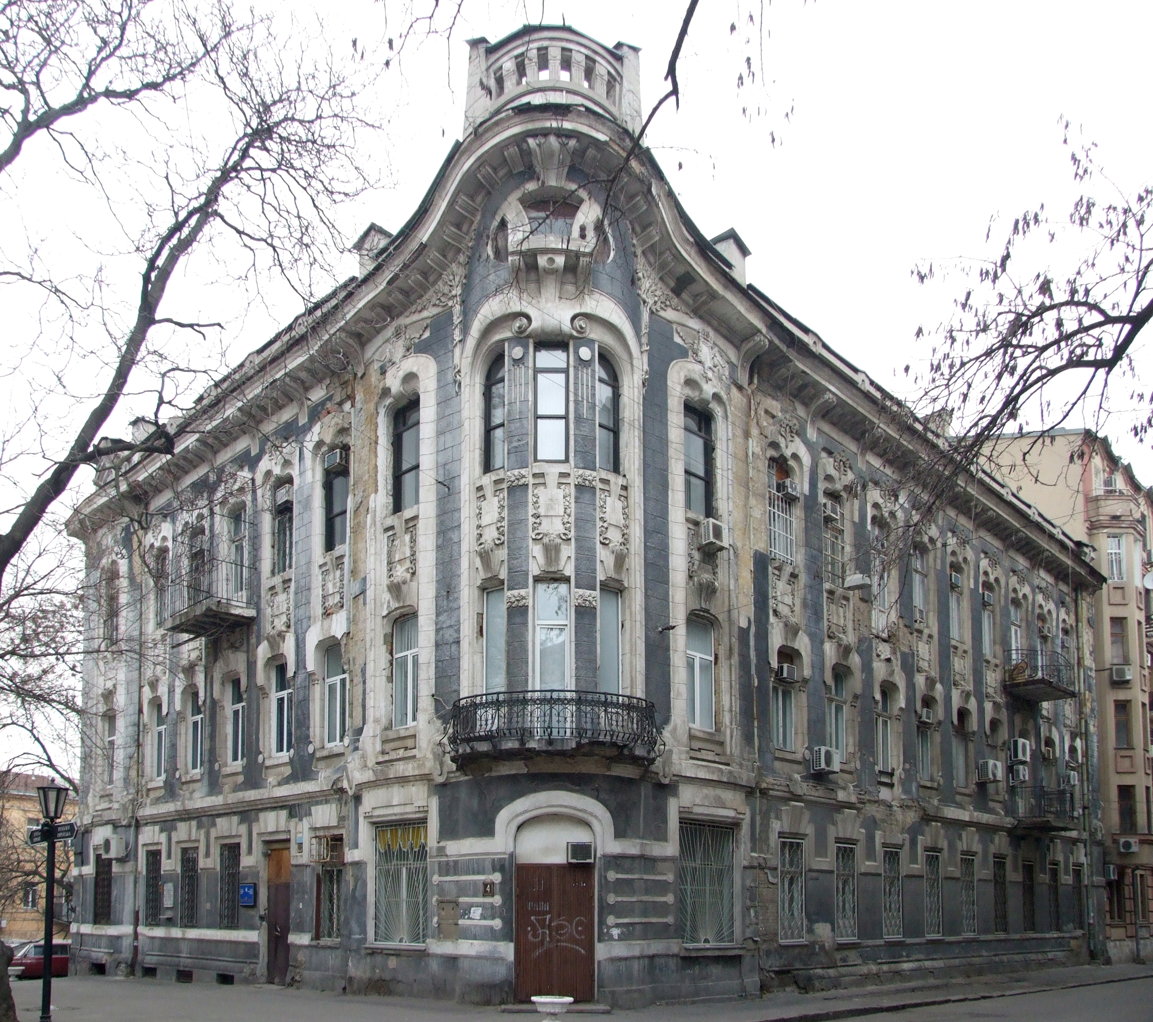 Будинок прибутковий Топуза, поч. ХХ ст.